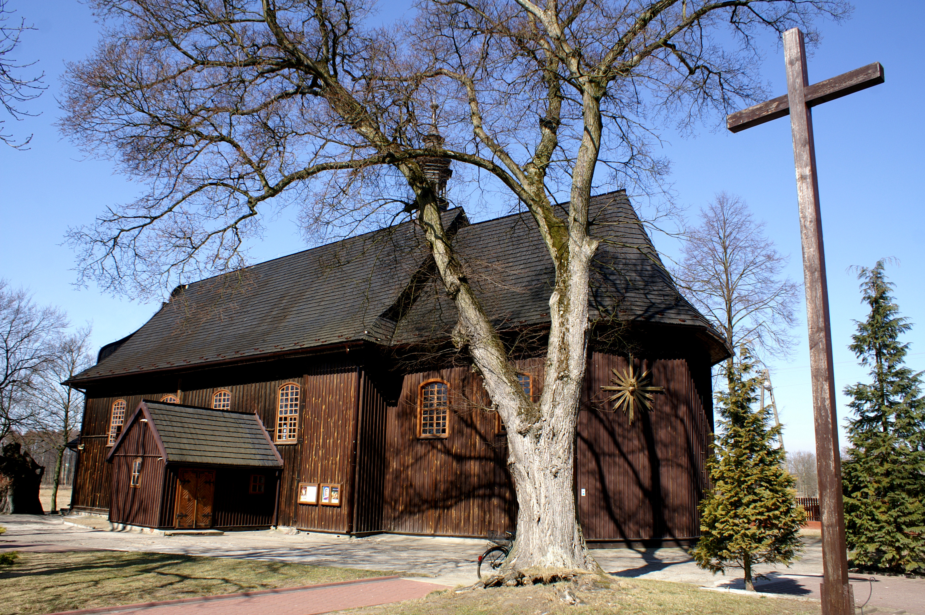 Wygiełzów (powiat bełchatowski) kościół parafialny pw. Nawiedzenia NMP, drewniany, 1796, Rejestr Zabytków nr rej.: 62 z 25.07.1967